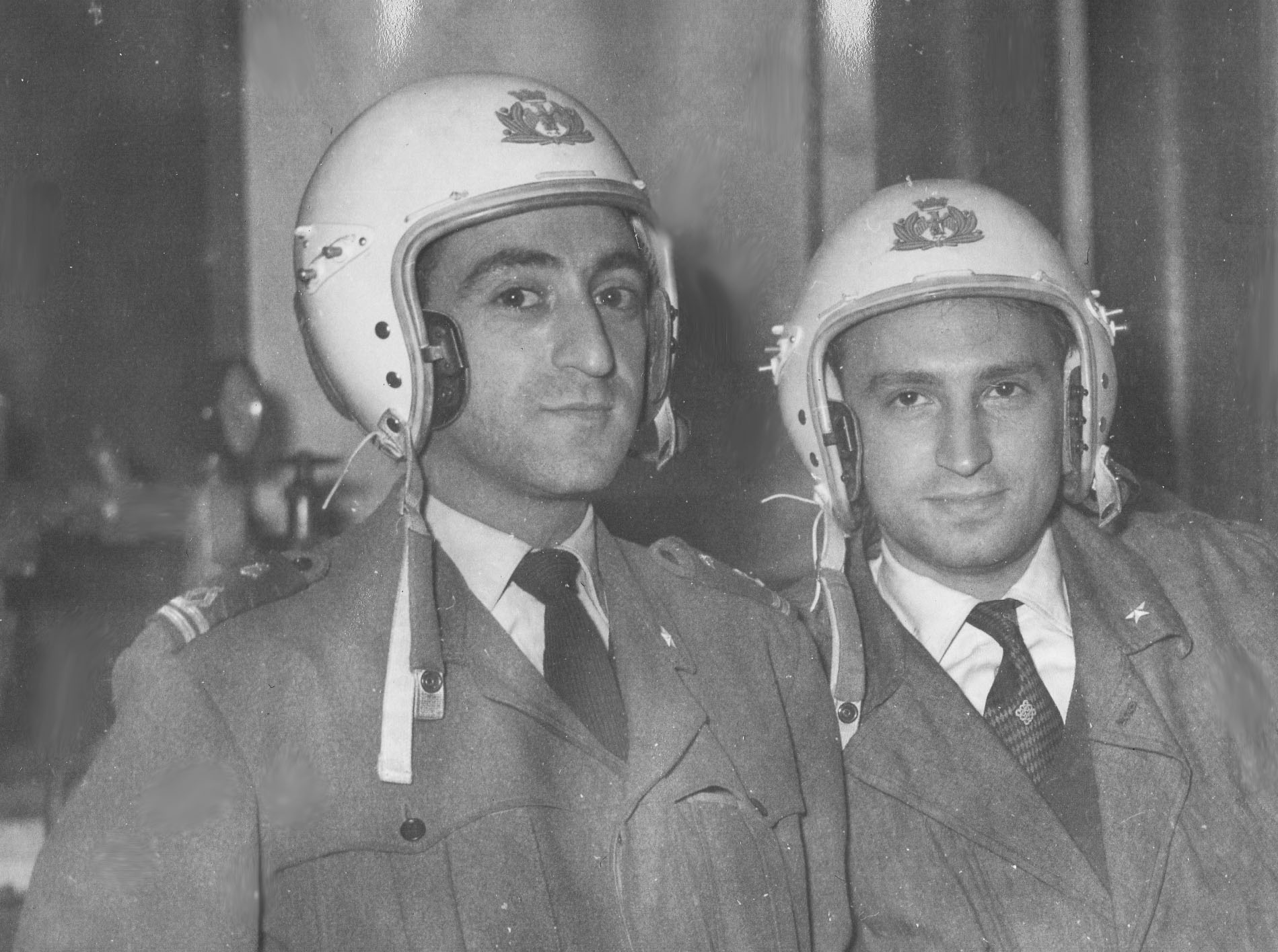 L'ingegnere in compagnia di un collega